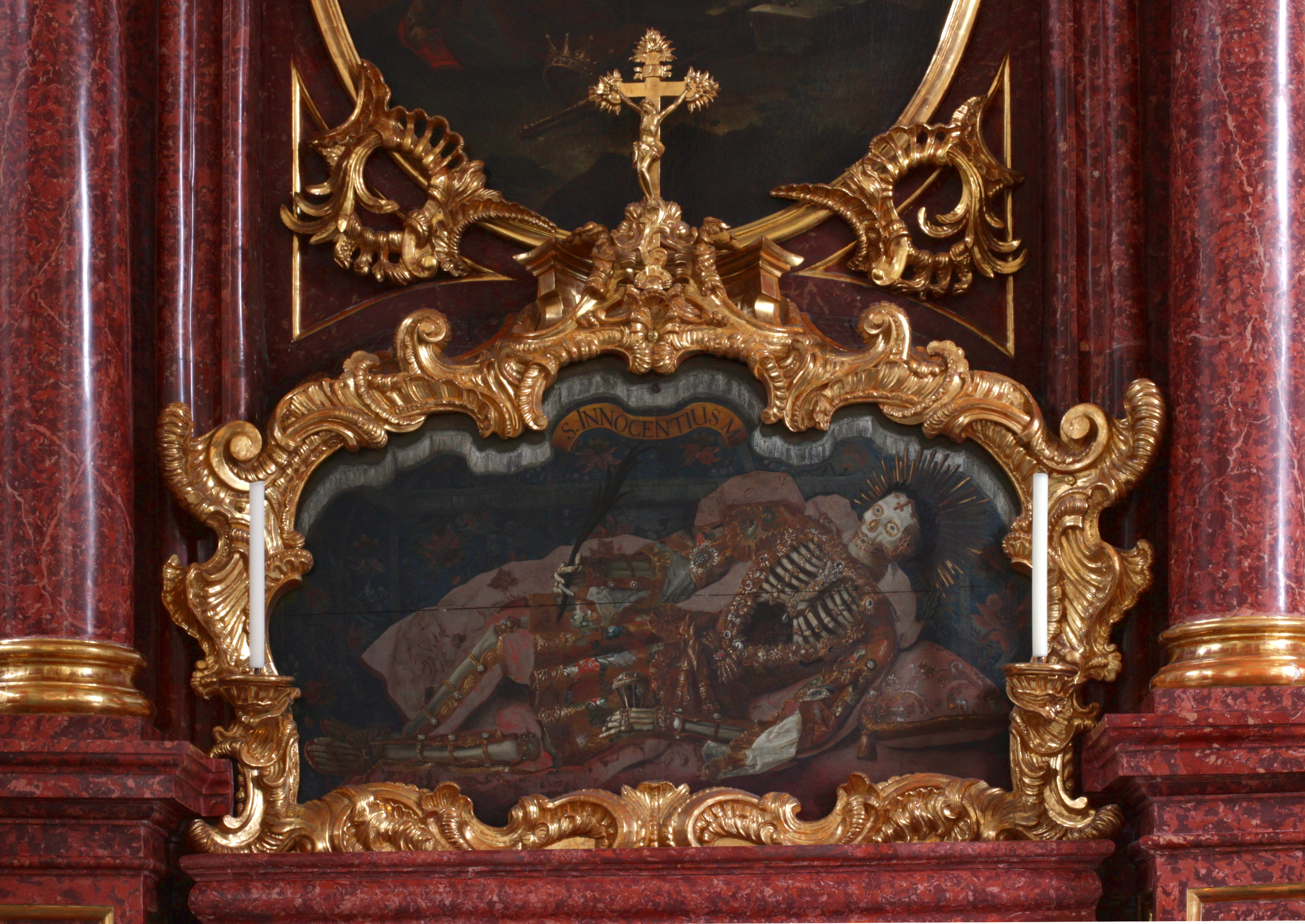 Altarblatt des Katakombenheiligen Innocentius, Basilika St. Lorenz, Kempten